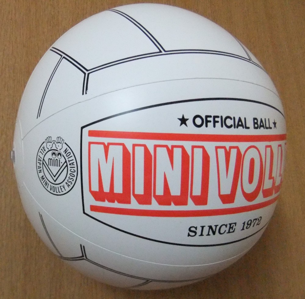 ミニバレーのボール